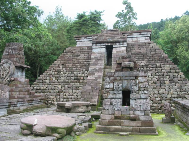 Candi Sukuh